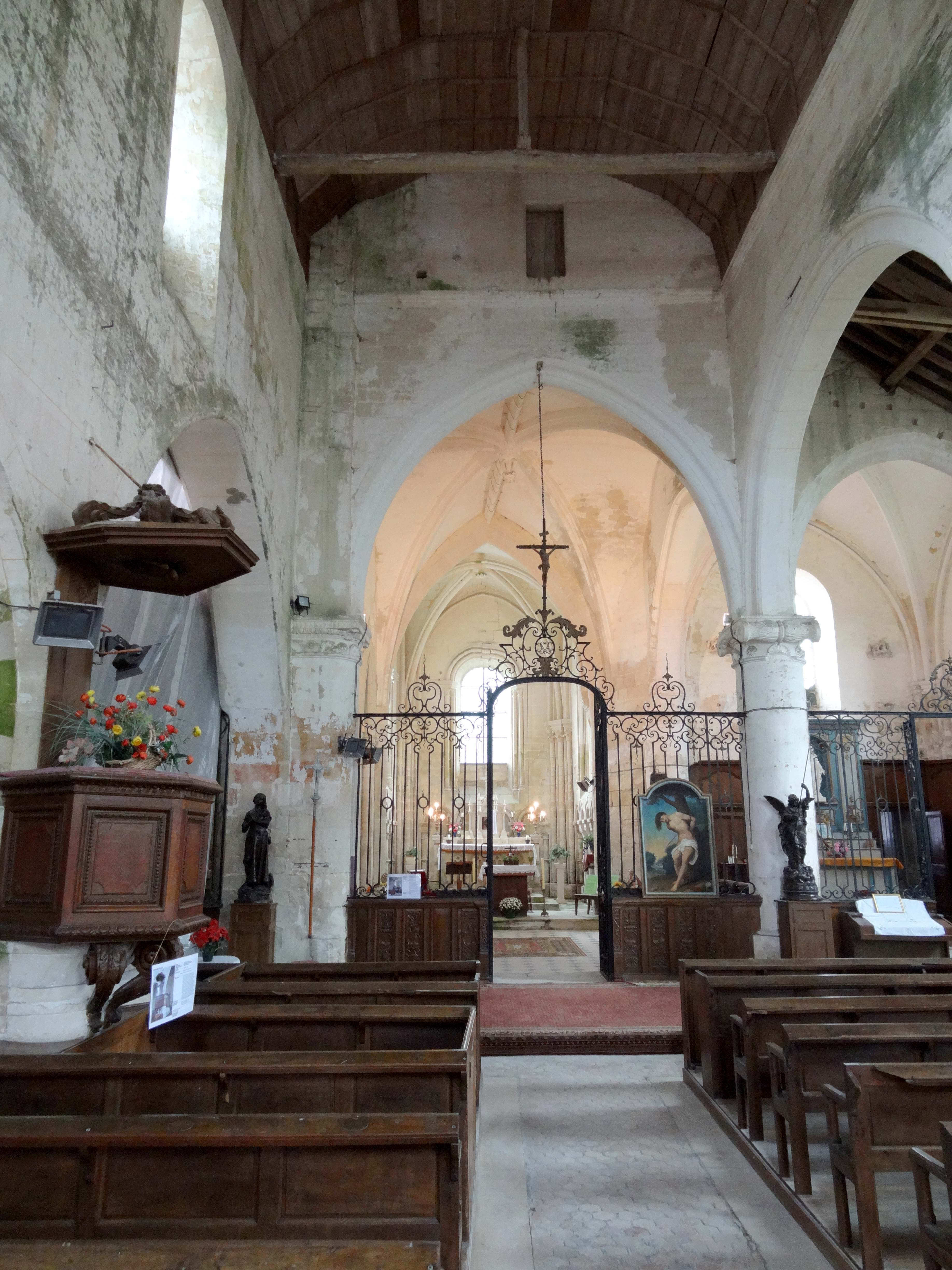 Intérieur de l'église - voir titre.